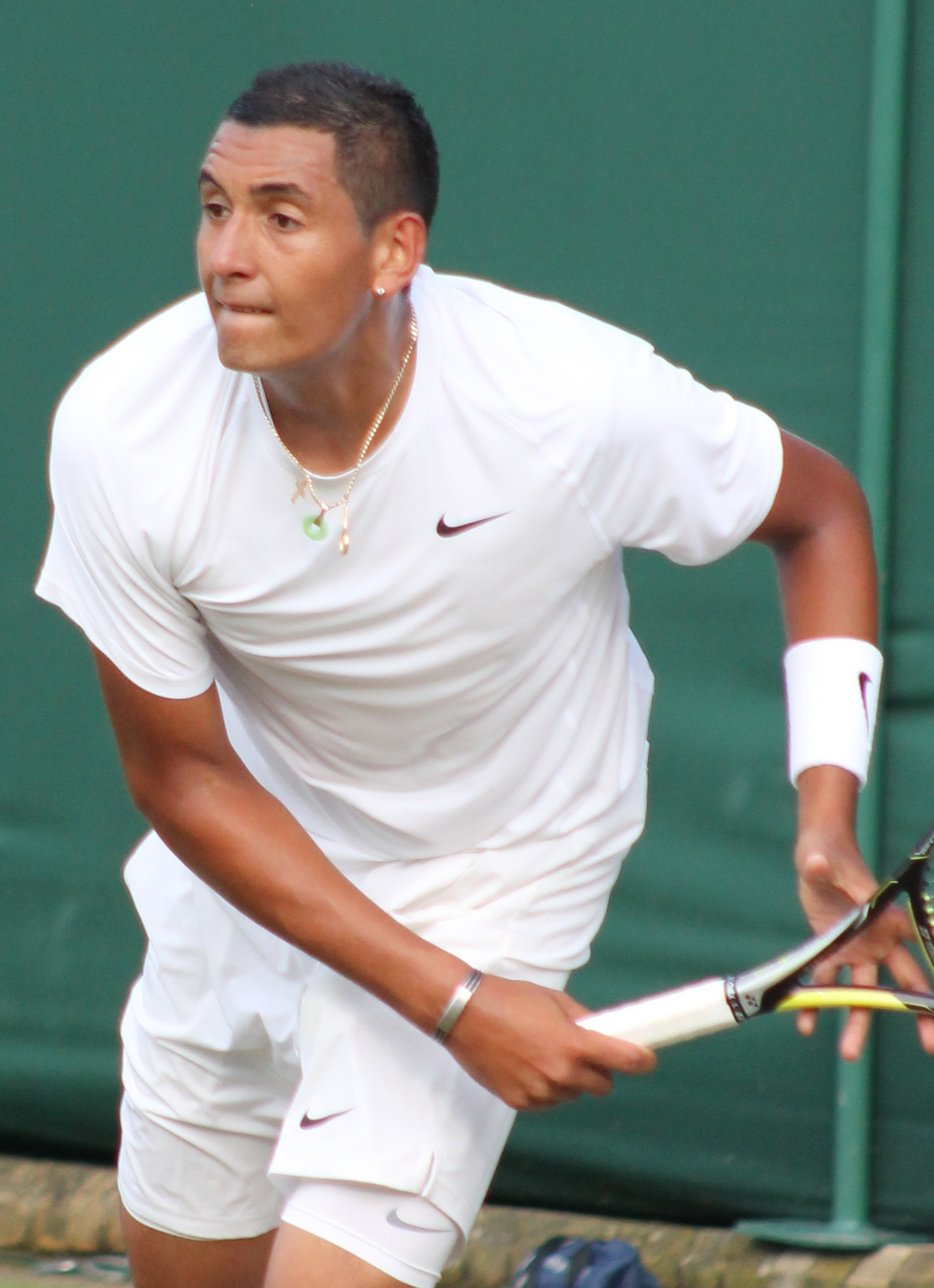 Kyrgios WM14 (1)